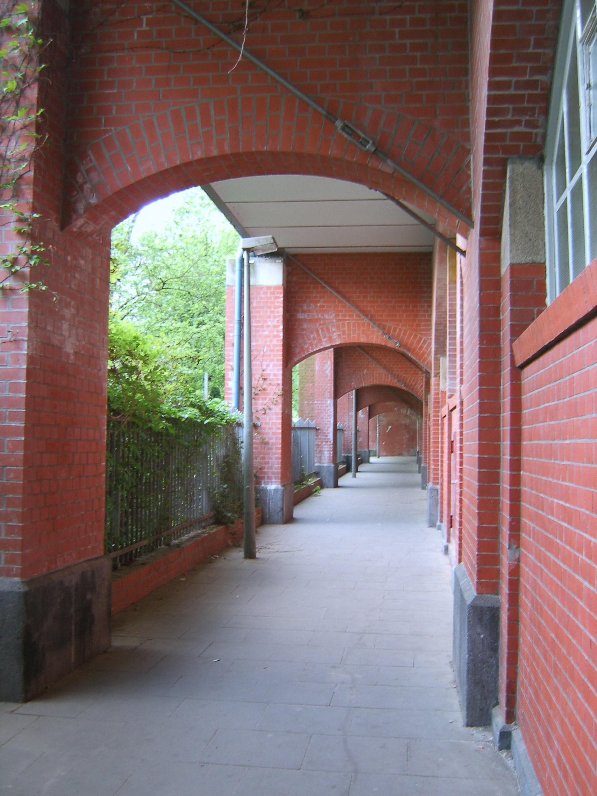 Fußweg an der U-Bahnstation Uhlandstraße in Hohenfelde. Der Bahnsteig liegt oberhalb des Weges.